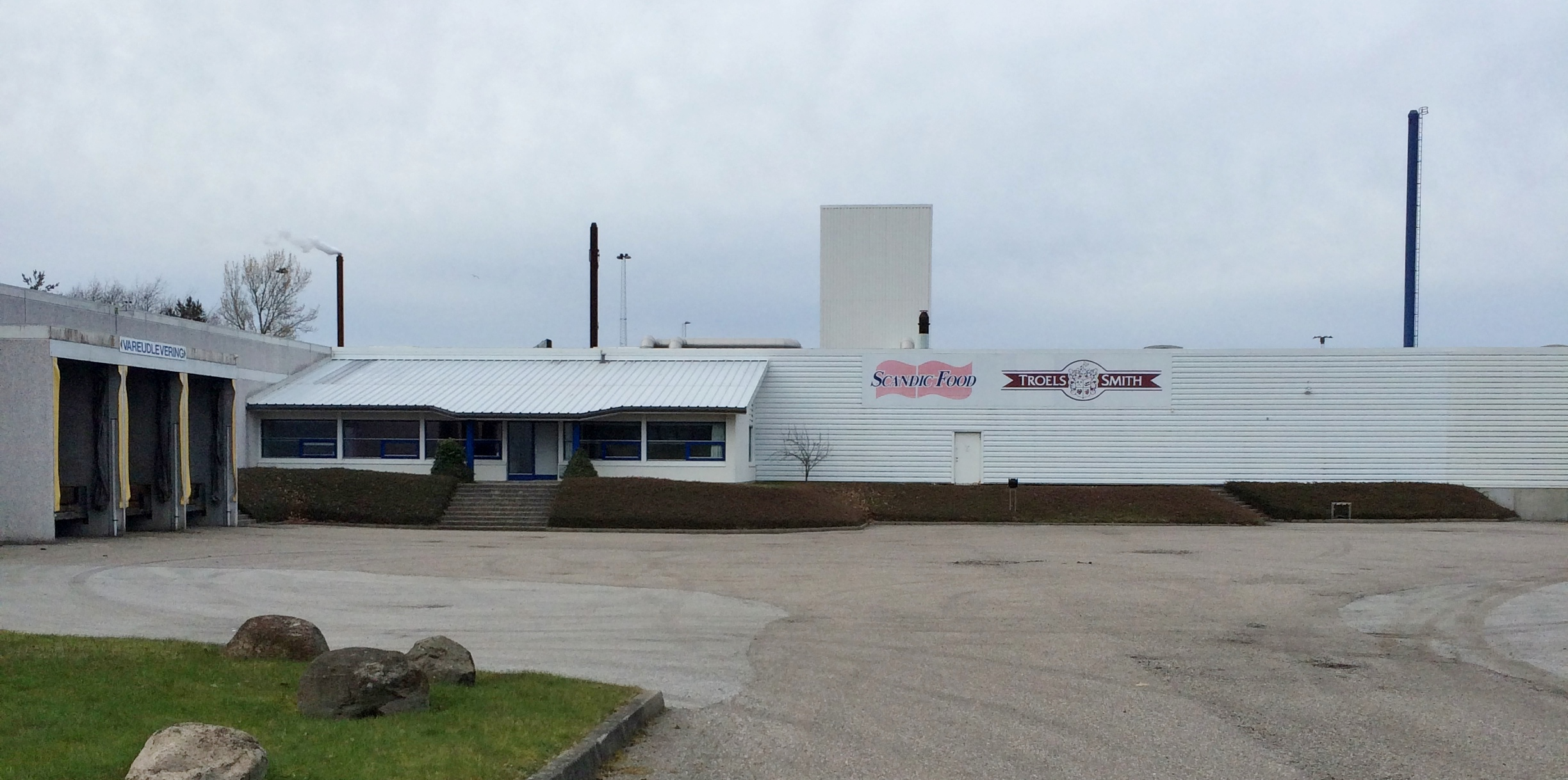 Den nu nedlagte Scandic Food fabrik i Hadsund.